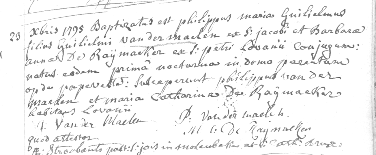 Cet acte lève définitivement le doute sur sa date de naissance fréquemment rapportée avoir eu lieu en 1791. Il est né à Bruxelles, paroisse Sainte Catherine, le 23 décembre 1795.